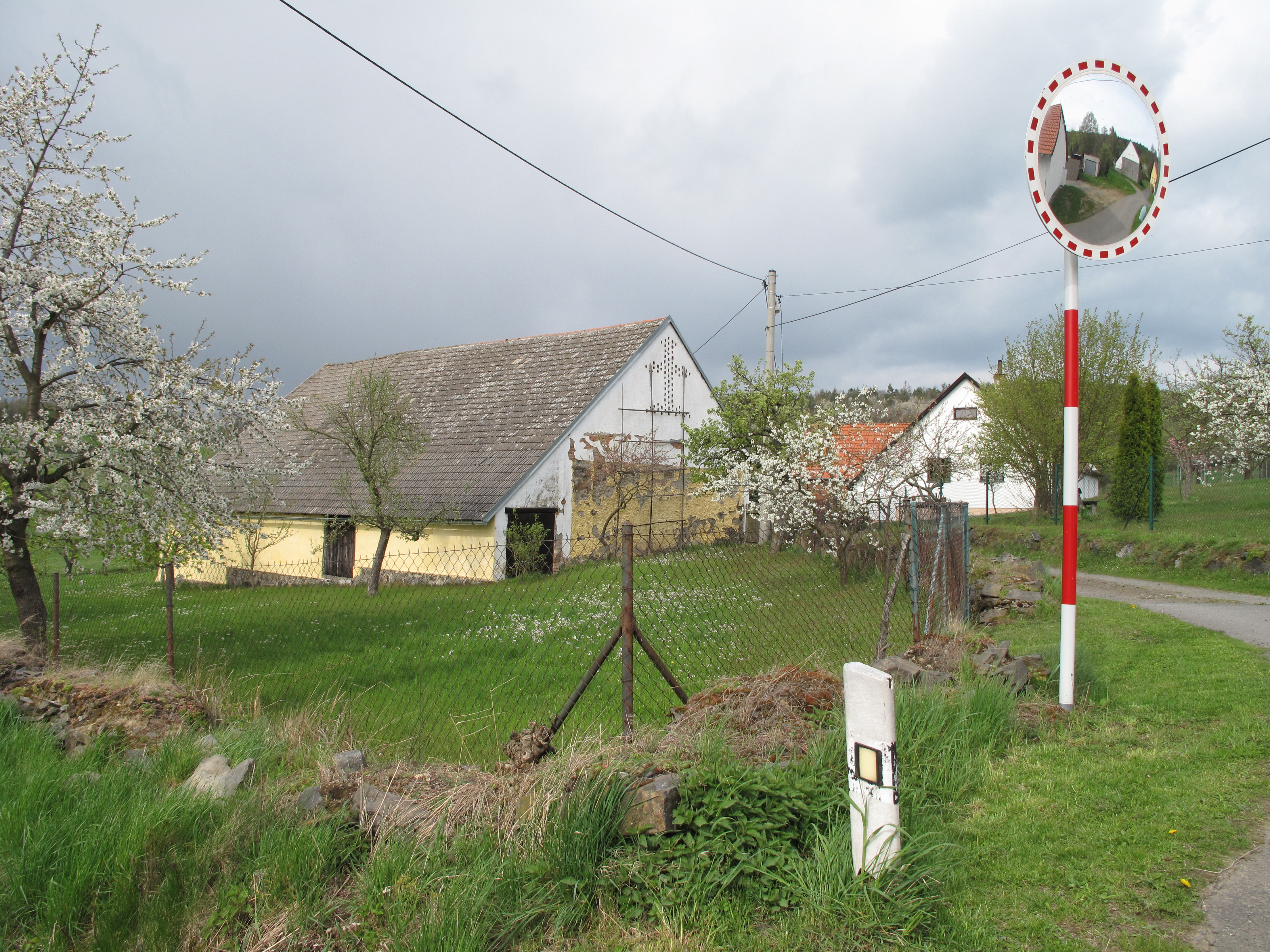 Sekrýt. Okres Klatovy, Česká republika.